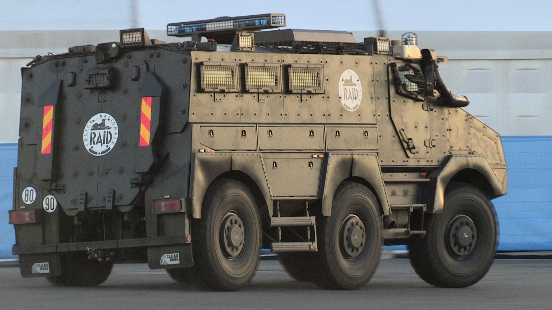 C'est l'un des blindé utilisé par le RAID. La photo a été prise a la COP 21 en 2016 au Bourget